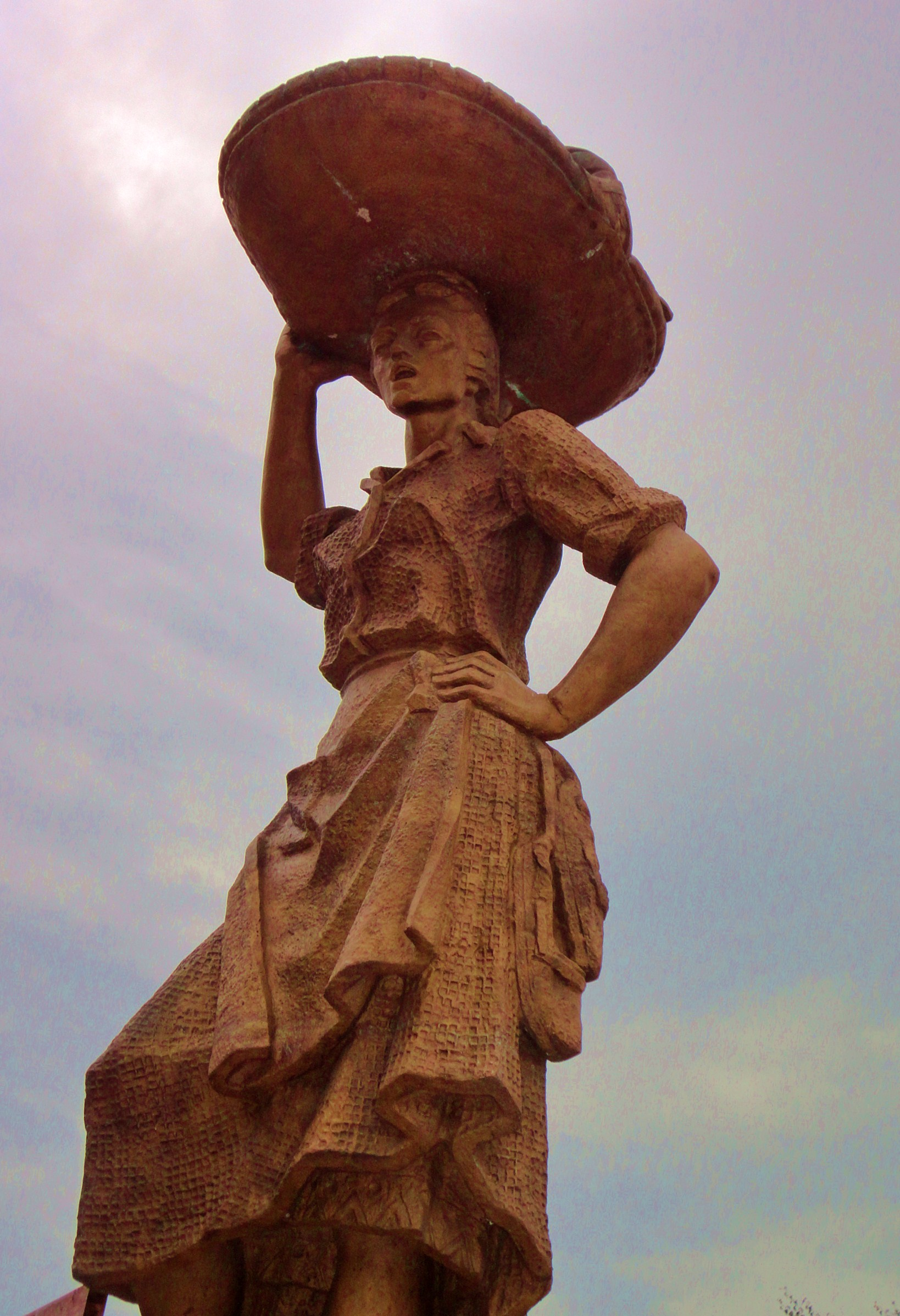 Estatua realizada por Joaquín Lucarini. Representa una típica sardinera de Santurce.